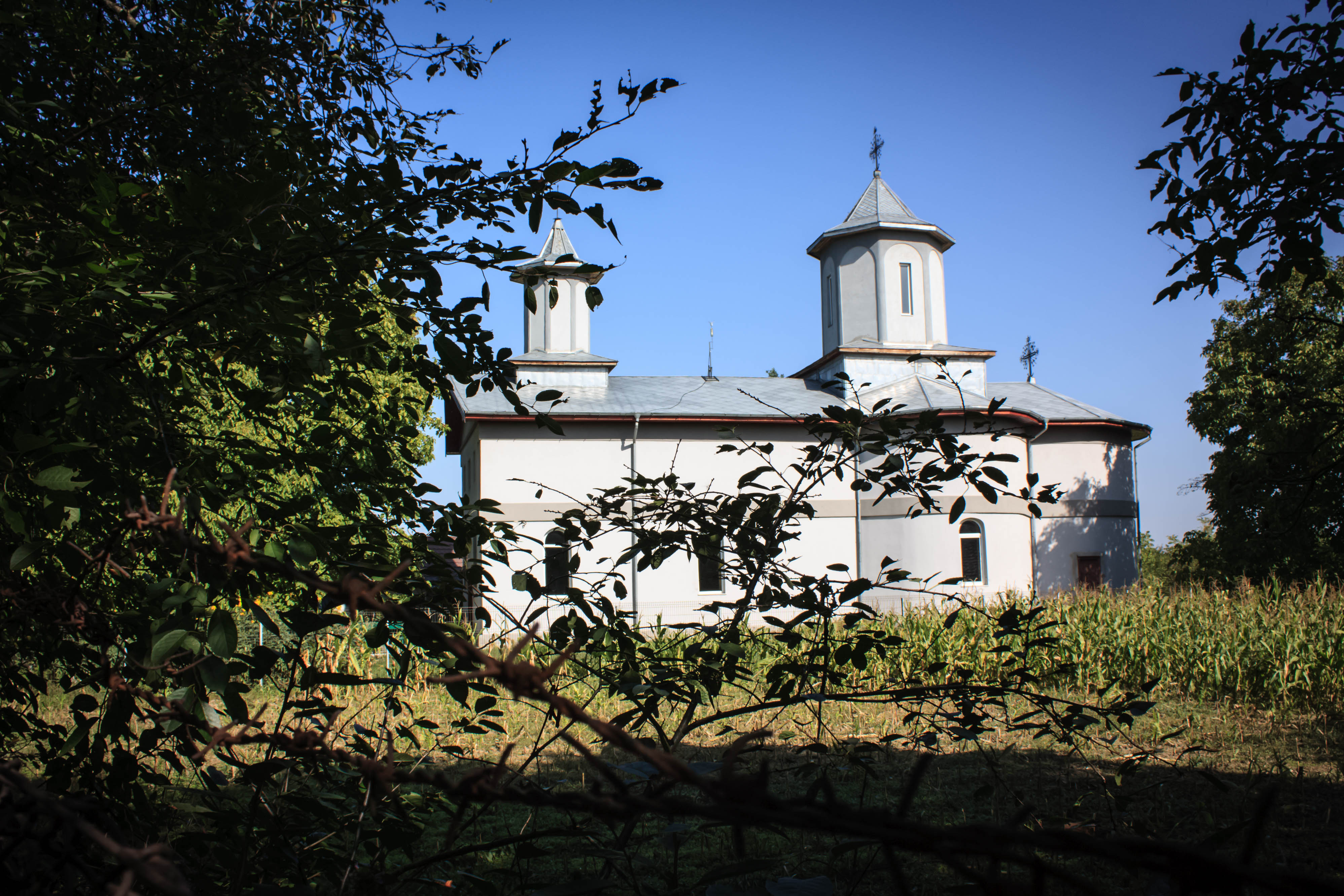 Biserica "Sf. Împărați Constantin și Elena"